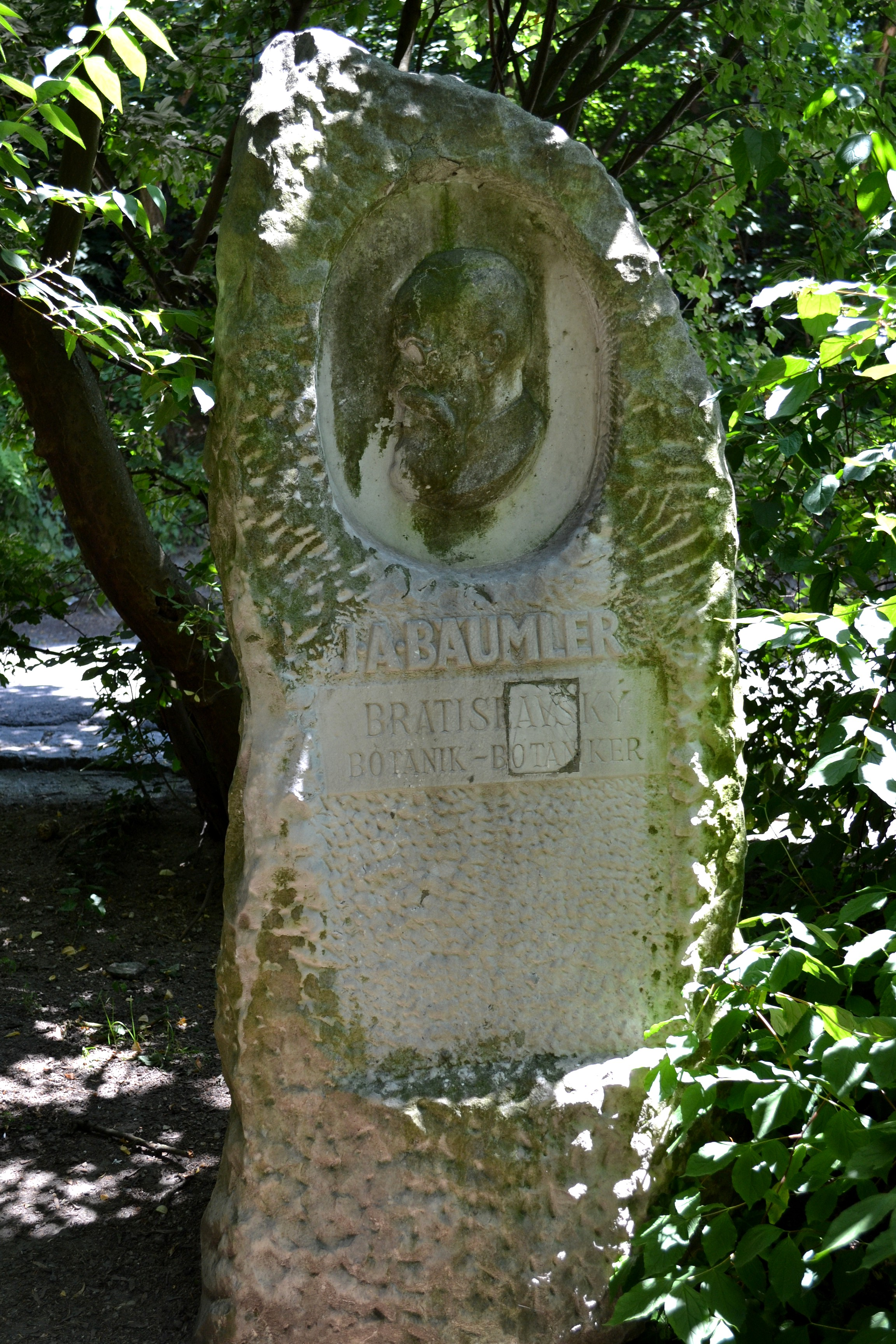 Pomník slovenského botanika a mykológa Johanna Andreasa Bäumlera (1847 - 1924) na Nekrasovovej ulici v Horskom parku Object location48° 09′ 23.04″ N, 17° 05′ 42″ E